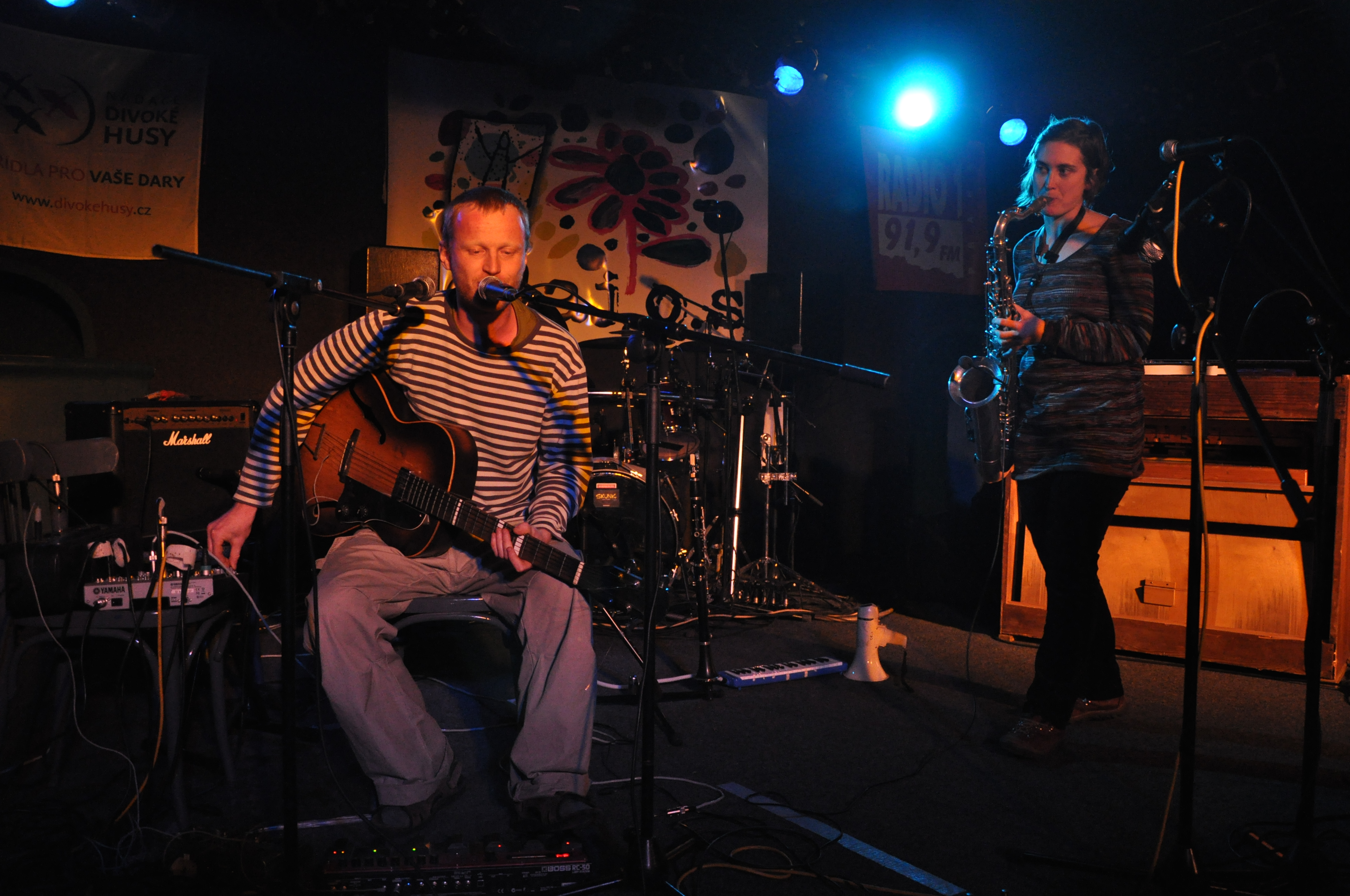 Skupina Dva.